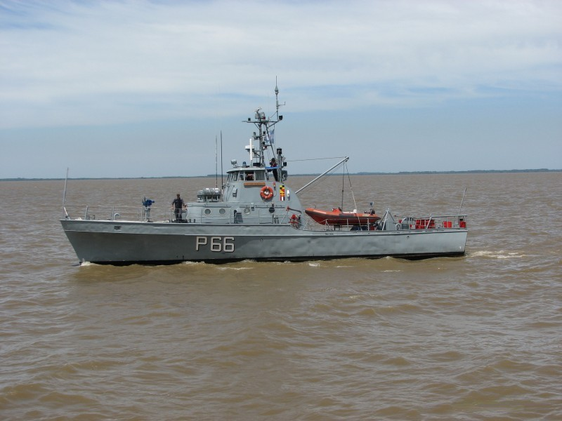 Point Class P-66 ARA Río Santiago.